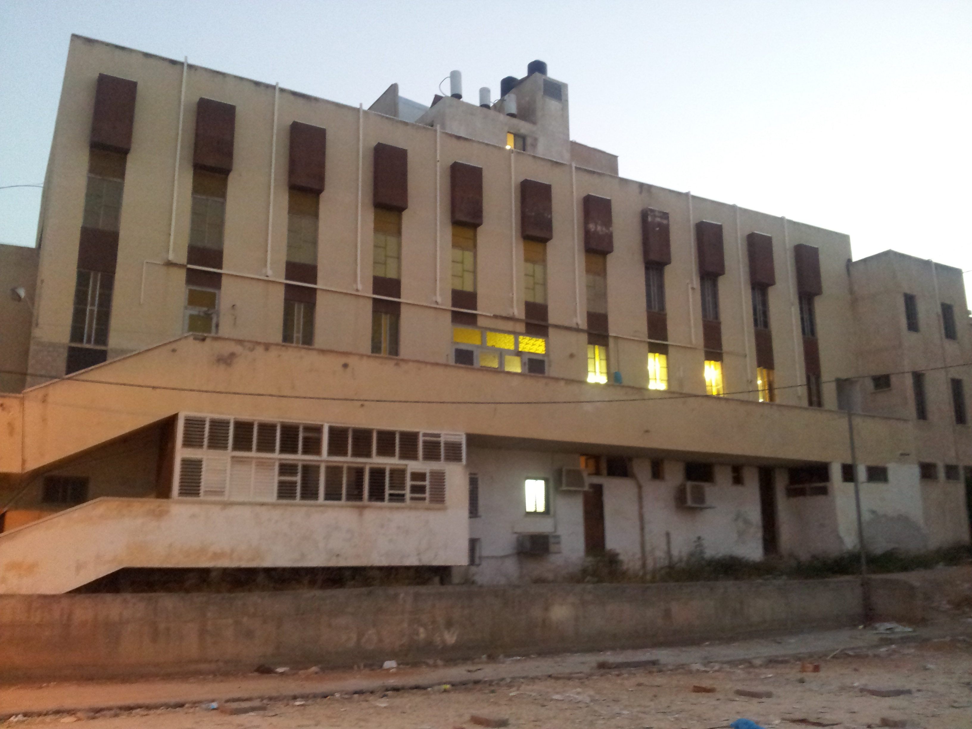 בית המדרש של הרב חיים גריינמן בבני ברק.